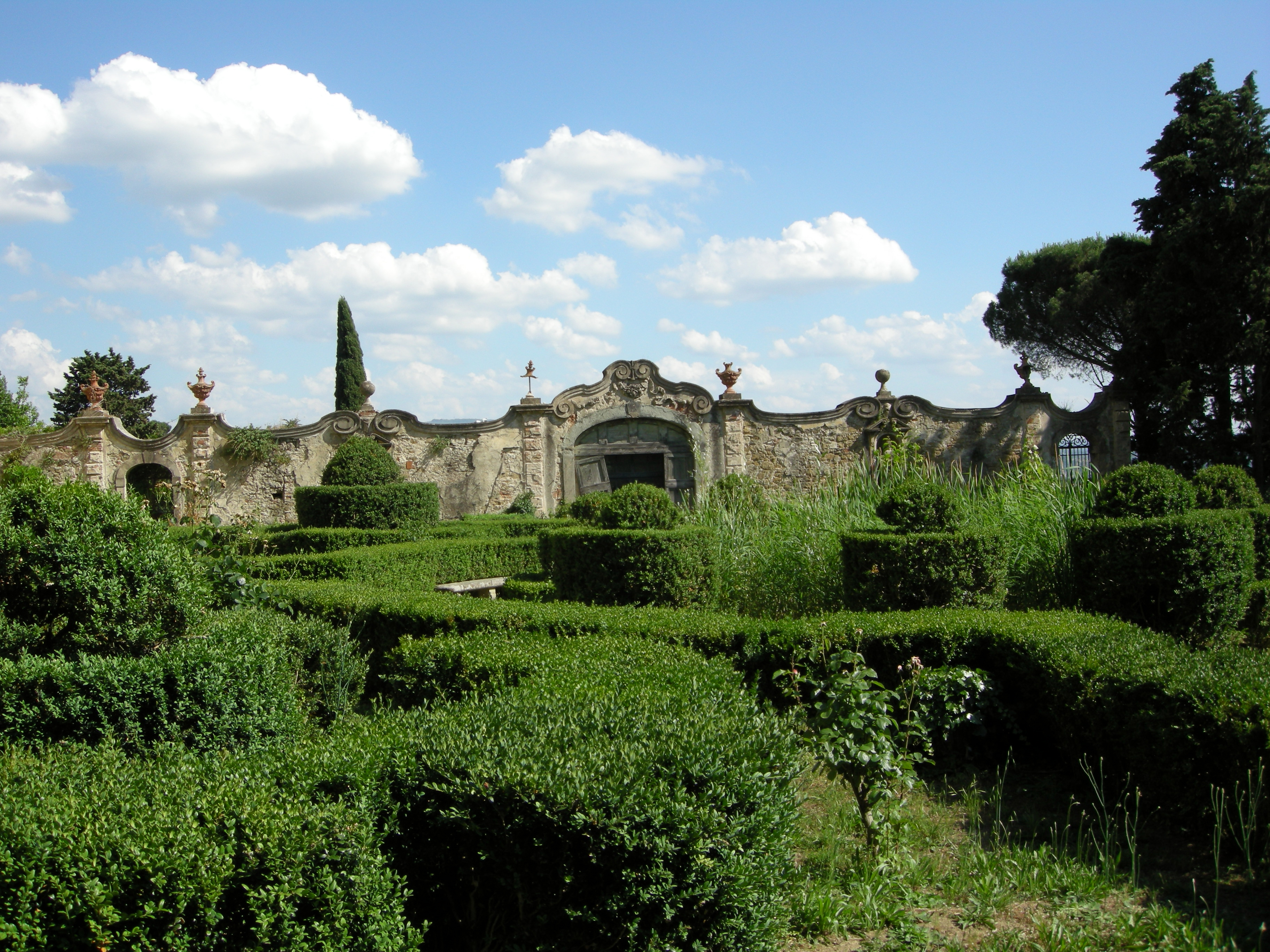 Villa La Torraccia